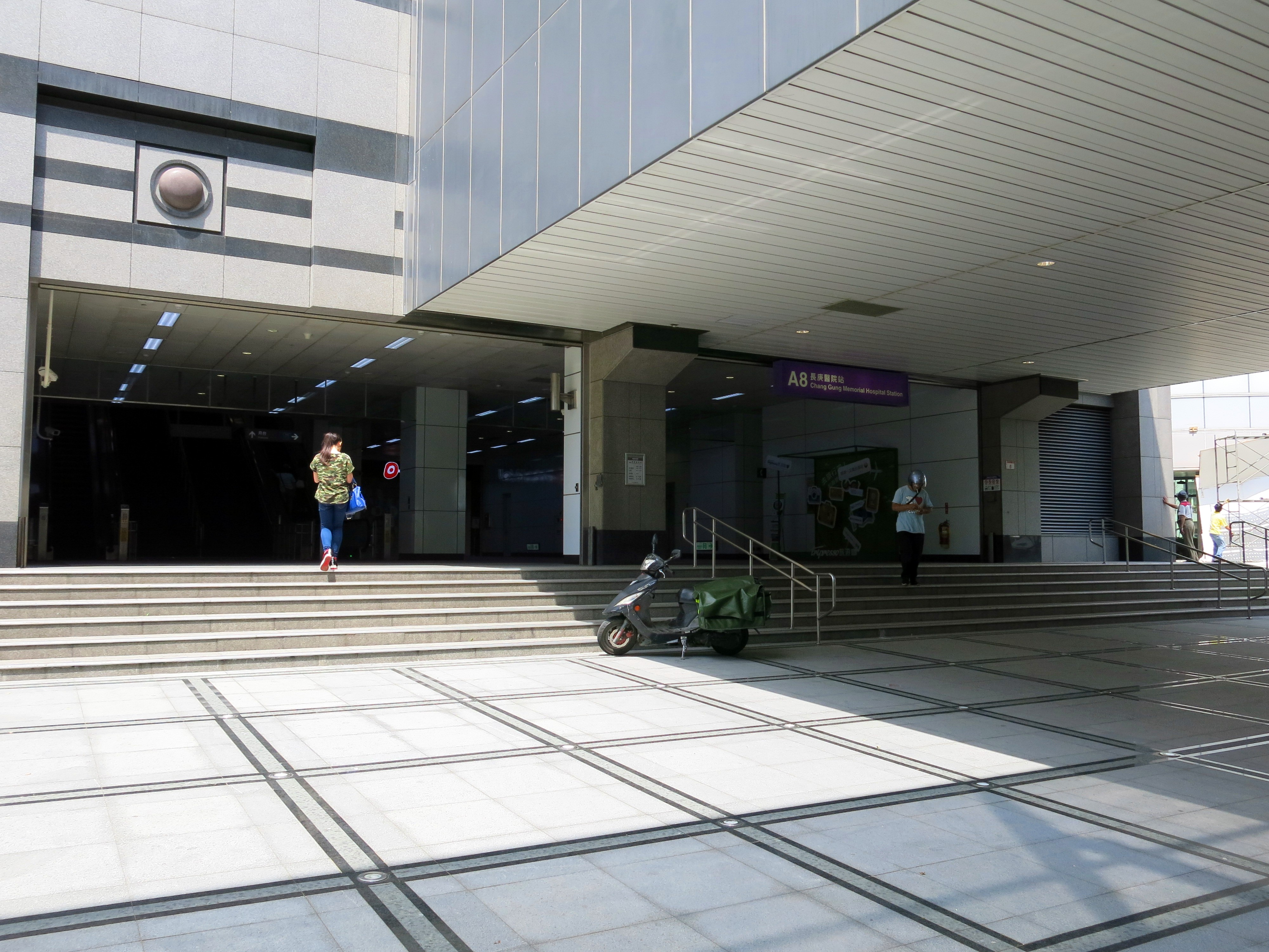 中文（台灣）: 桃園捷運機場線A8長庚醫院站